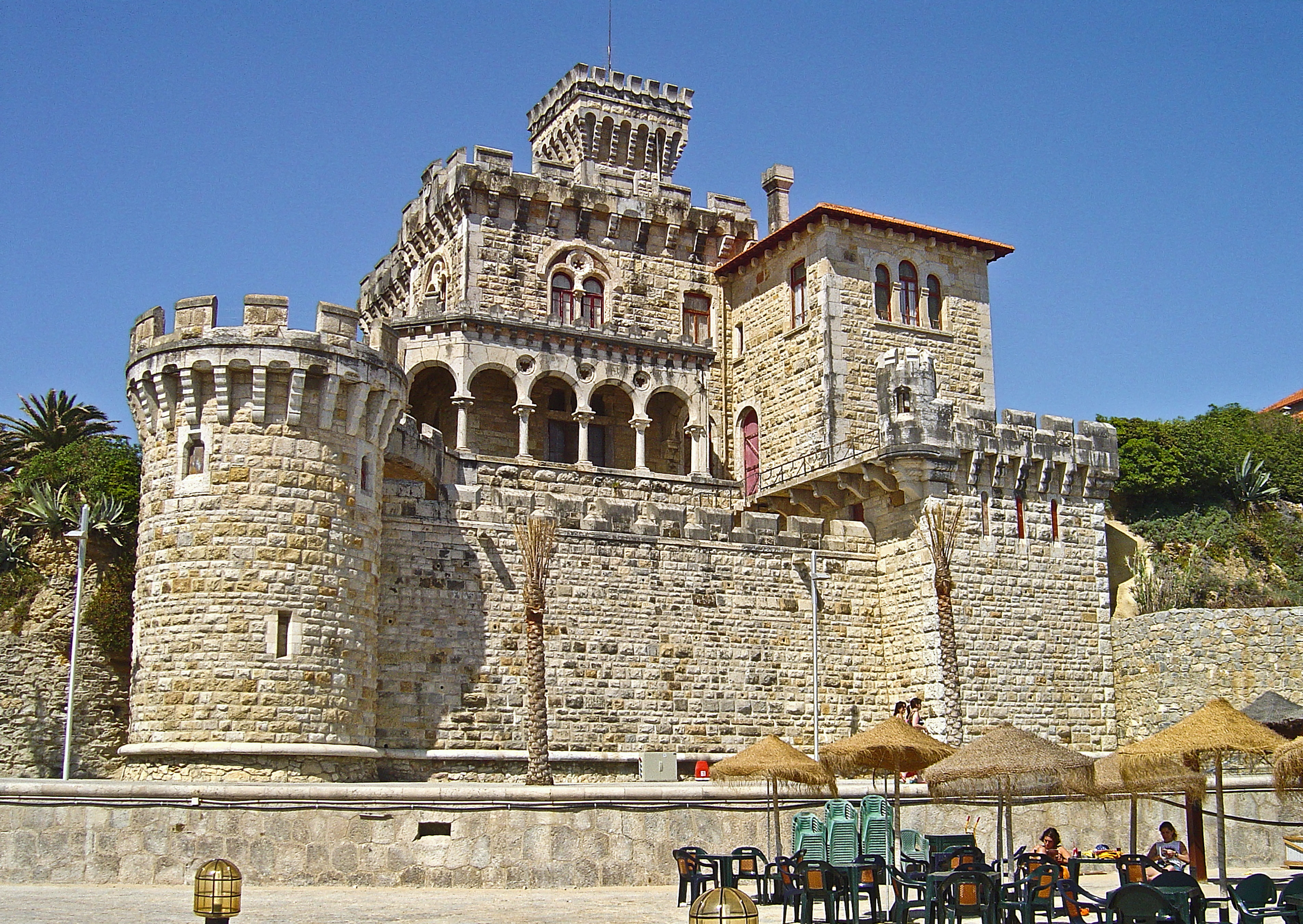 Esta casa, que parece um Castelo, e é um ex-libris do Estoril, aparecendo em todas as fotos, postais e pinturas, não se não, uma casa particular, cujo nome original é..., Villa Barros ou Forte da Cruz. Mandado construir pelo Senhor Barros, o seu proprietário, cujo nome se deve a um Forte que ali existiu. Esta casa foi mandada construir nos finais do século XIX sobre as ruínas do Forte santo António da Cruz, na Rua de Olivença no Estoril! É também conhecida por Chalet Barros! This is a house, not a castle!! See where this picture was taken. [?]